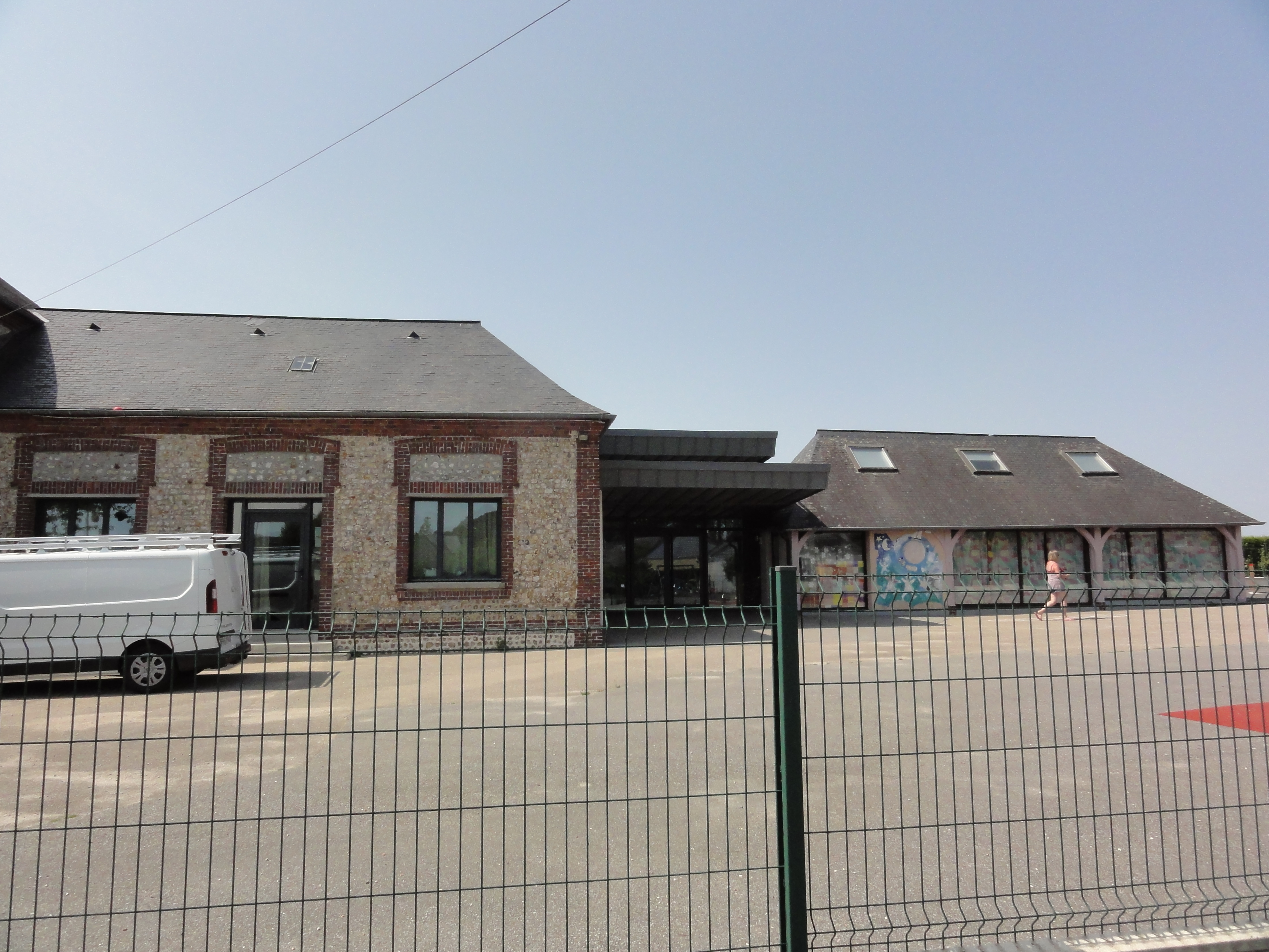 Ypreville-Biville (Seine-Mar.) école